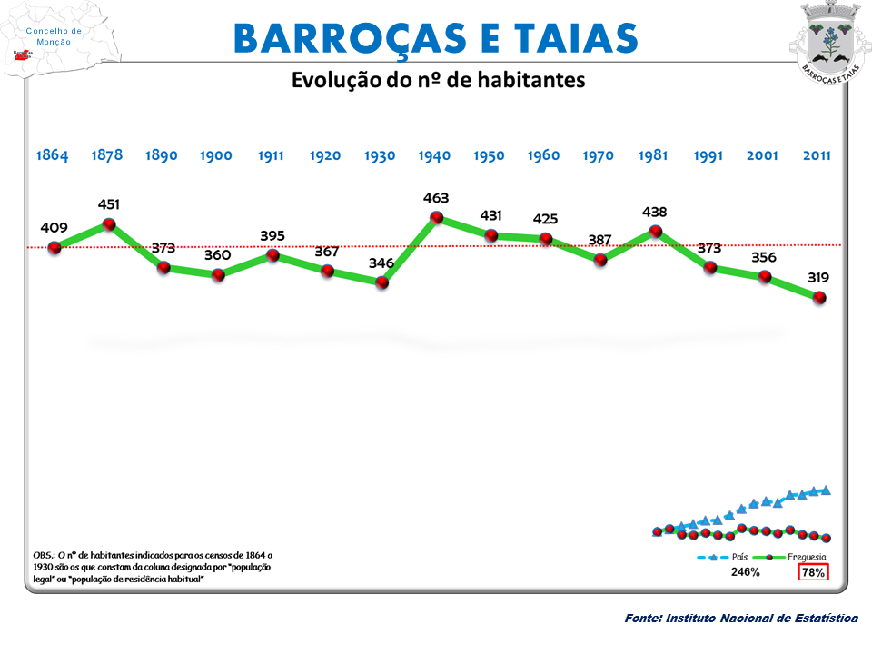 Censos 1864/2011